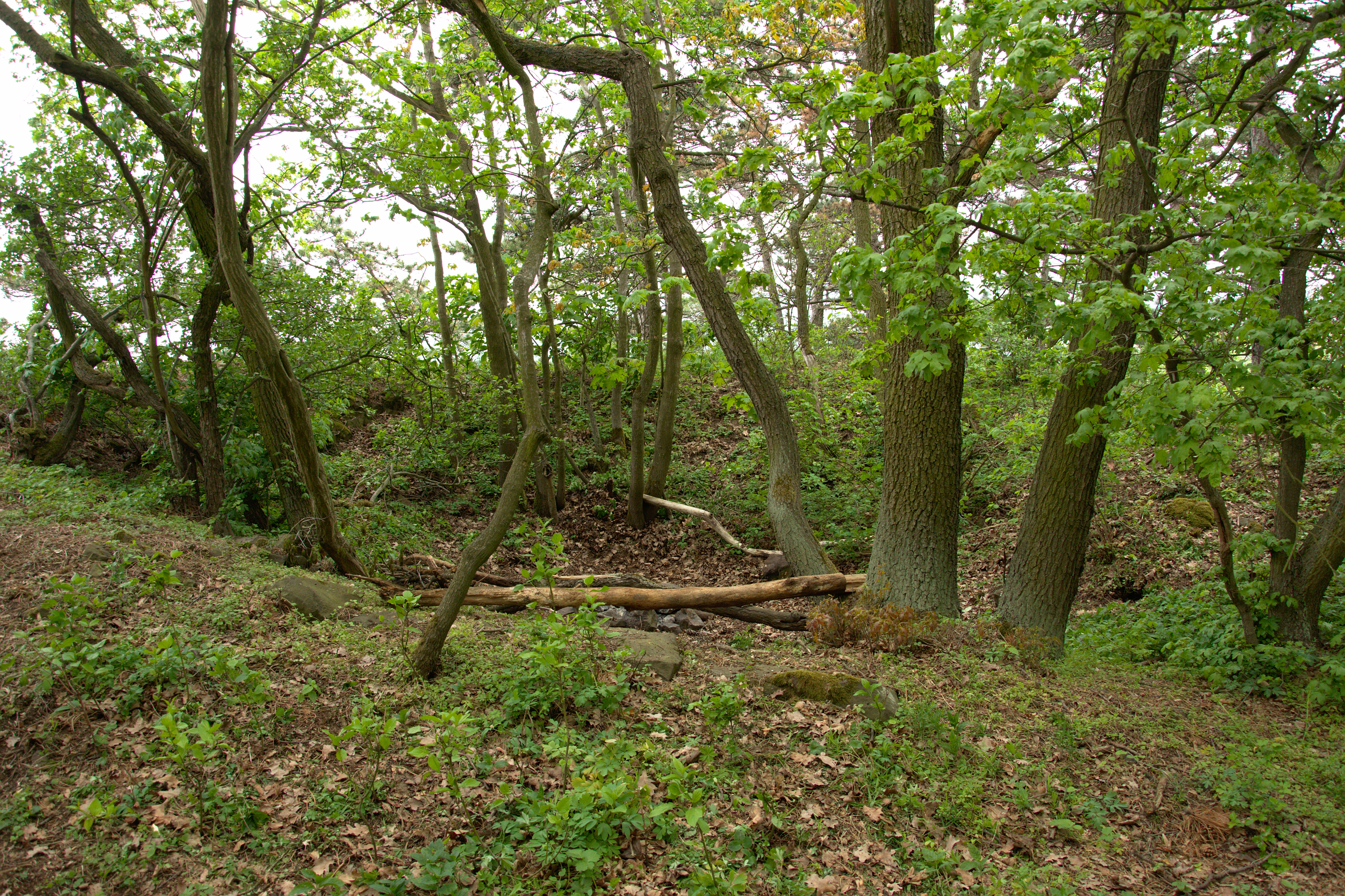 Hrad na Blešenském vrchu – zahloubený relikt po budově na severozápadním konci hradu